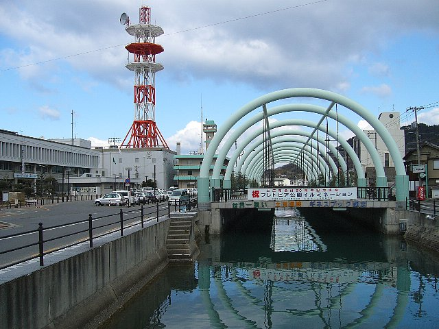 土渕海峡（香川県土庄町） 永代橋から西望 正面はモニュメント 左手の建物は土庄町役場